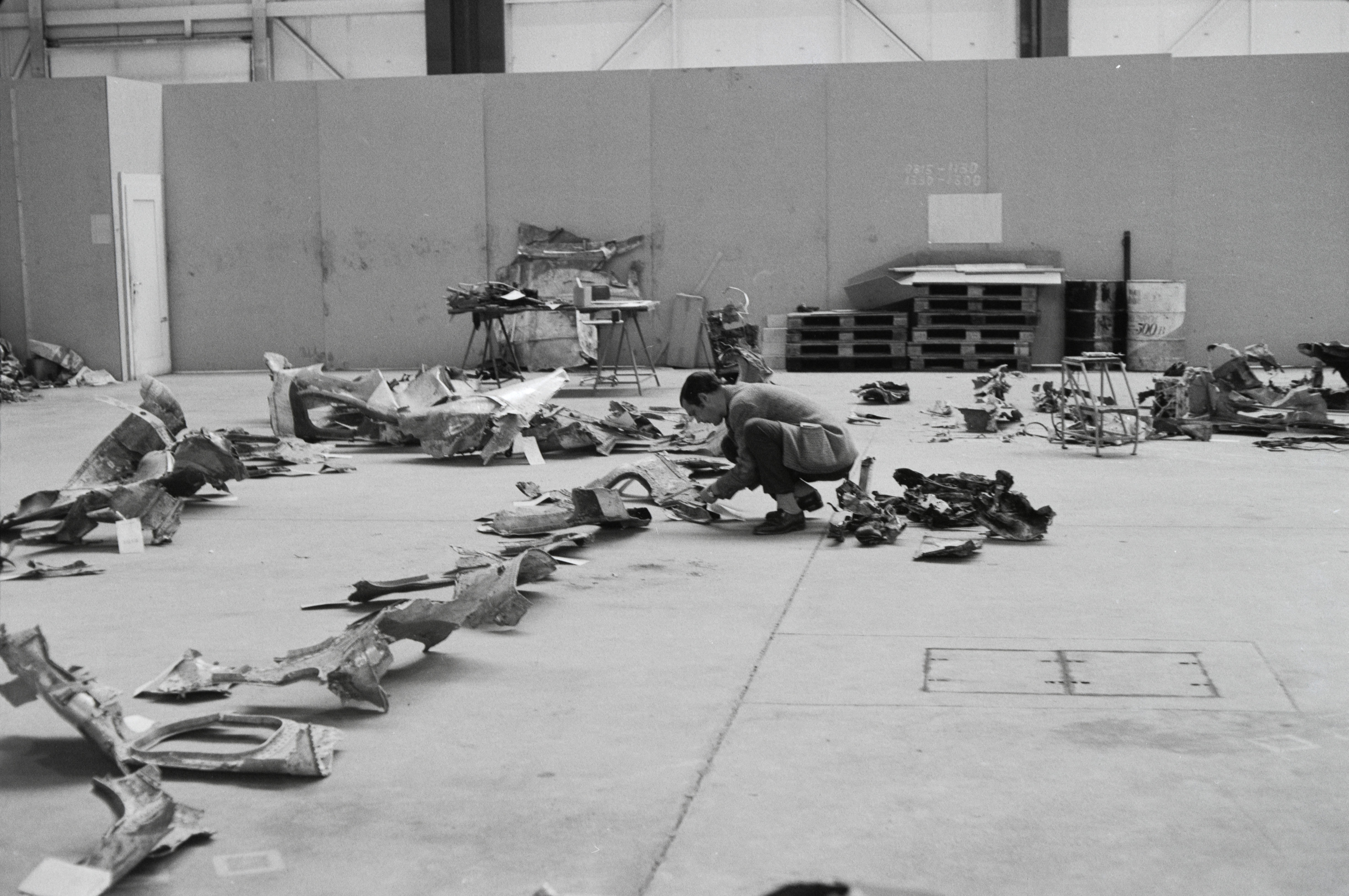 Untersuchung der Wrackteile der Convair CV-990-30 A Coronado, HB-ICD "Basel-Land" nach dem Bombenanschlag am 21.2.1970